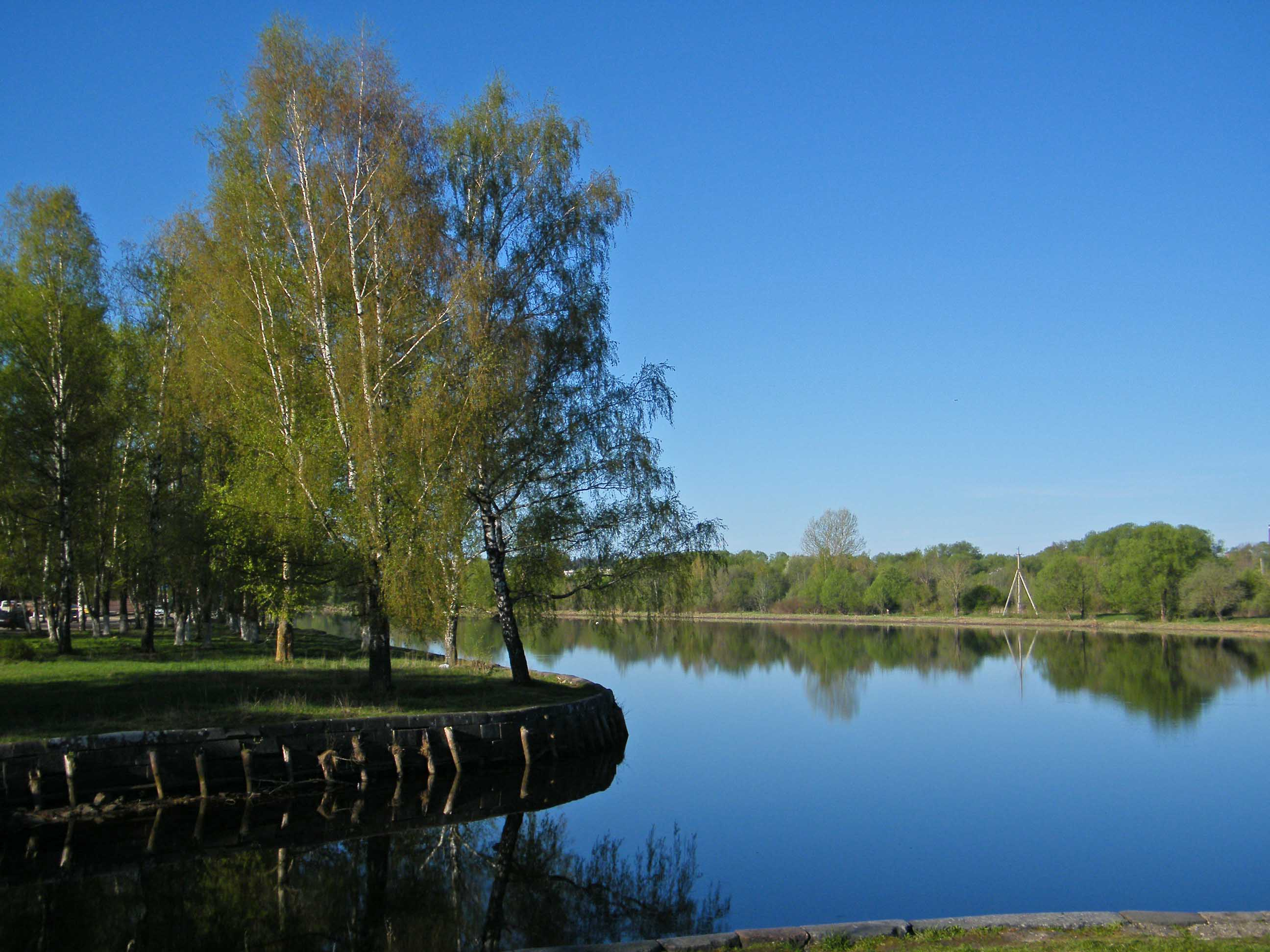 Водная система